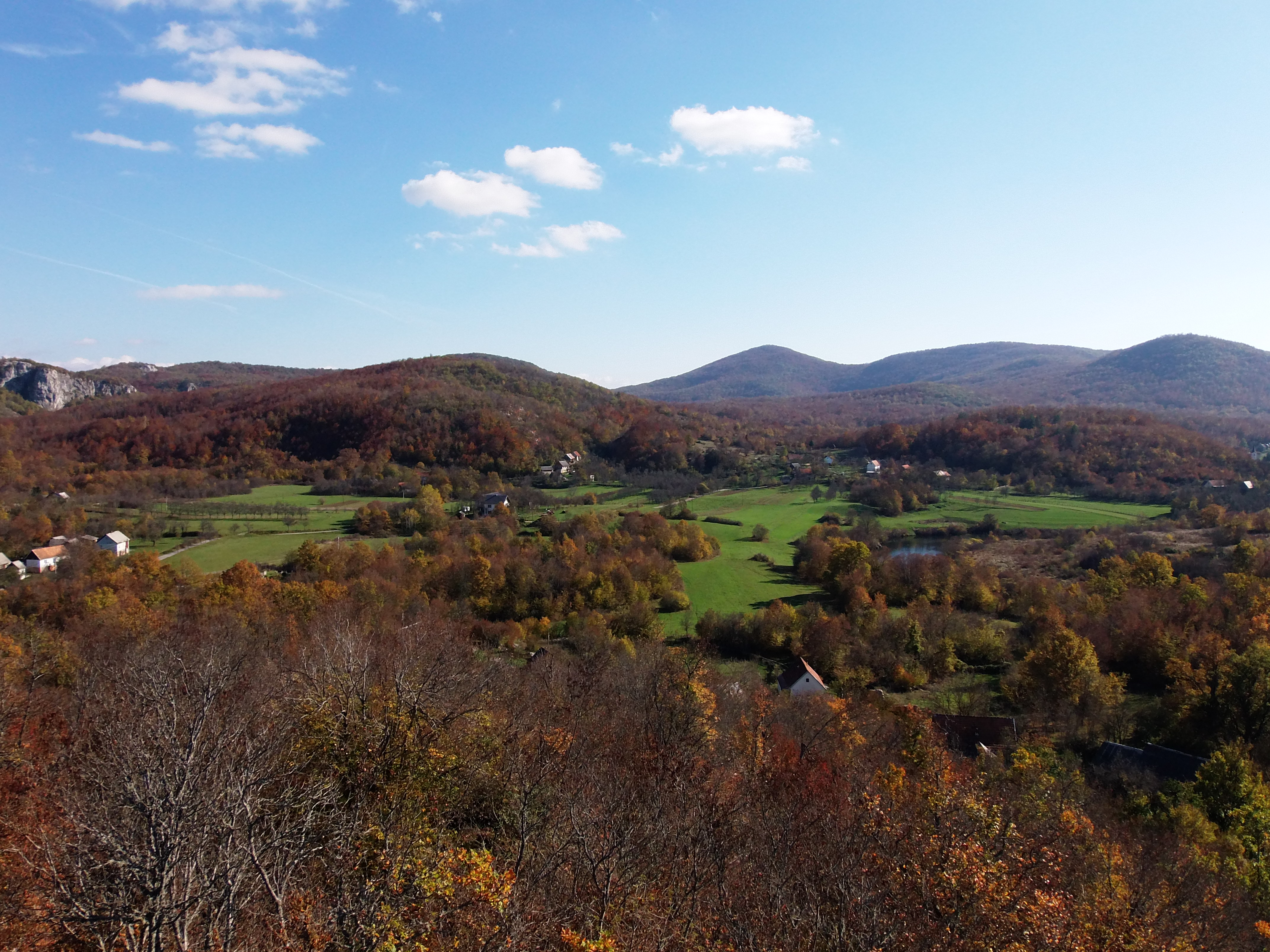 Млаква је мјесто уз ријеку Лику, код Горњег Косиња, у Западној Лици.